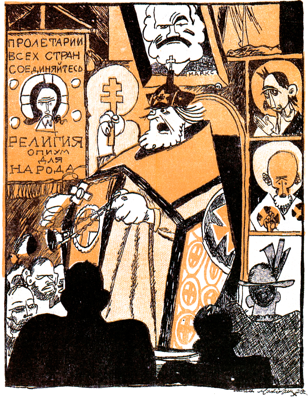 Иван Малютин. Карикатура на «красную церковь». «Среди некоторых церковных служителей возникла мысль об организации „красной церкви". „Если есть краскупы (красные купцы), — рассуждают они, — то почему же не могут существовать краспопы?"». Много нынче развелось у нас церквей: Есть «живая», есть «живой» ещё живей! Есть живейшая, и есть совсем «антик» — Церкви новые пекутся каждый миг. Церковь красную выдумывает поп, Церкви новые заткнуть за пояс чтоб! Рядом с Марксом — лик «божественный» Христа, На иконе — серп и молот... Кра-со-та! («Крокодил». 1923 г.)